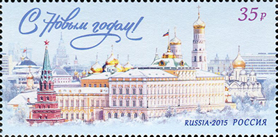 С Новым годом!